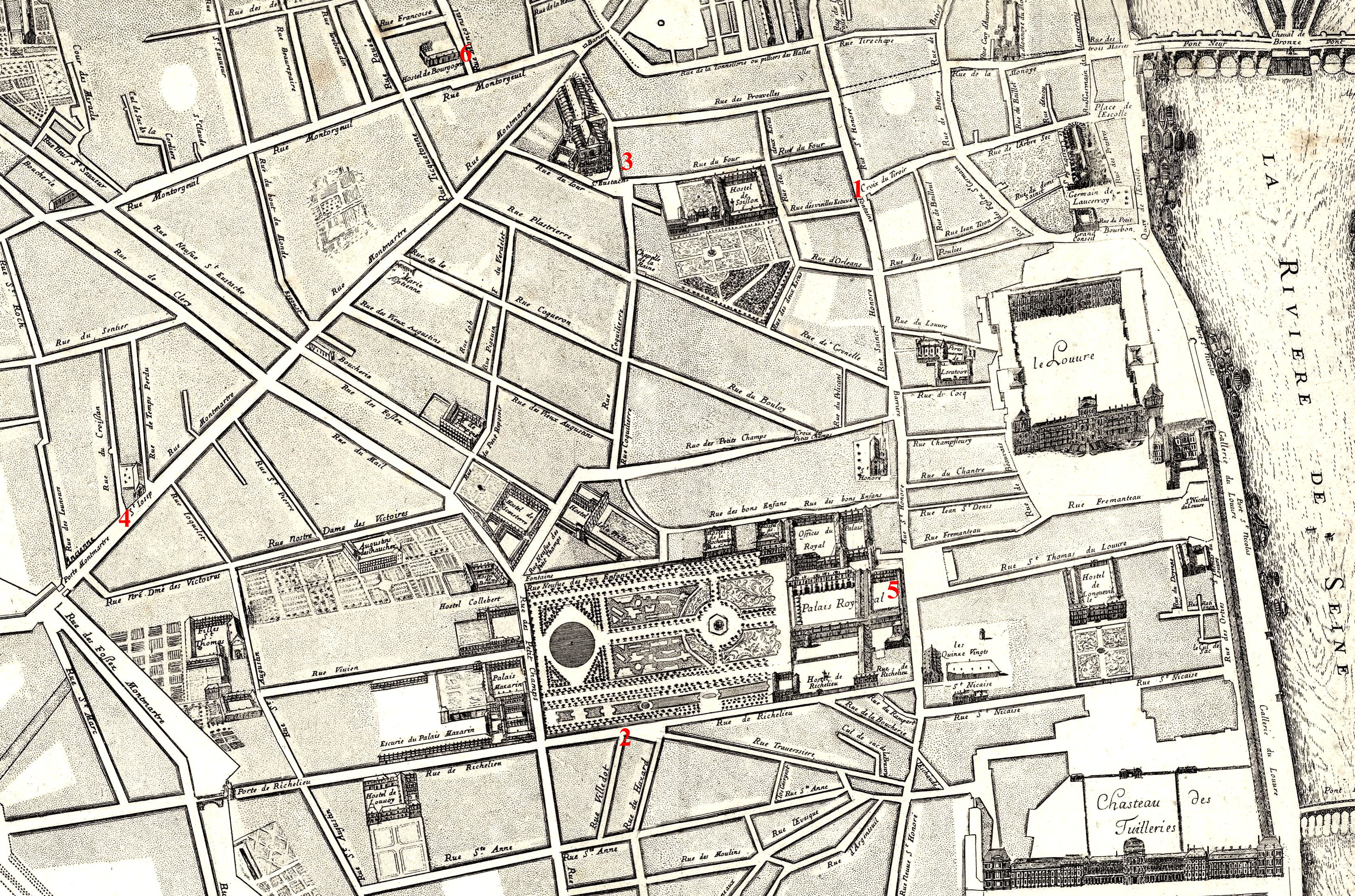 Plan de Paris de Bullet et Blondel (détail, modifié)les lieux indiqués par des chiffres rouges sont 1. la maison natale de Molière, 2. la maison mortuaire de Molière, 3. l'église Saint-Eustache, 4. le cimetière Saint-Joseph, 5. la salle du Palais-Royal, le théâtre et l'hôtel de Bourgogne.A droite bord de Seine et port Saint-Nicolas.